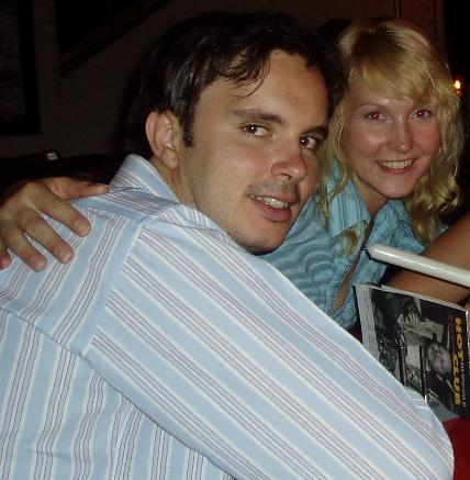 Autor: Rubén Rodríguez Abril Es una fotografía para mi página personal.